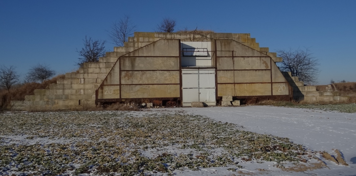 Schrono - hangar typu AU-16/2 dla samolotu Su-27, w byłym garnizonie Kluczewie, 2016 r.